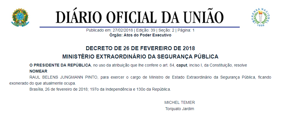 Decreto presidencial de nomeação de Raul Jungmann para o Ministério Extraordinário da Segurança Pública do Brasil.